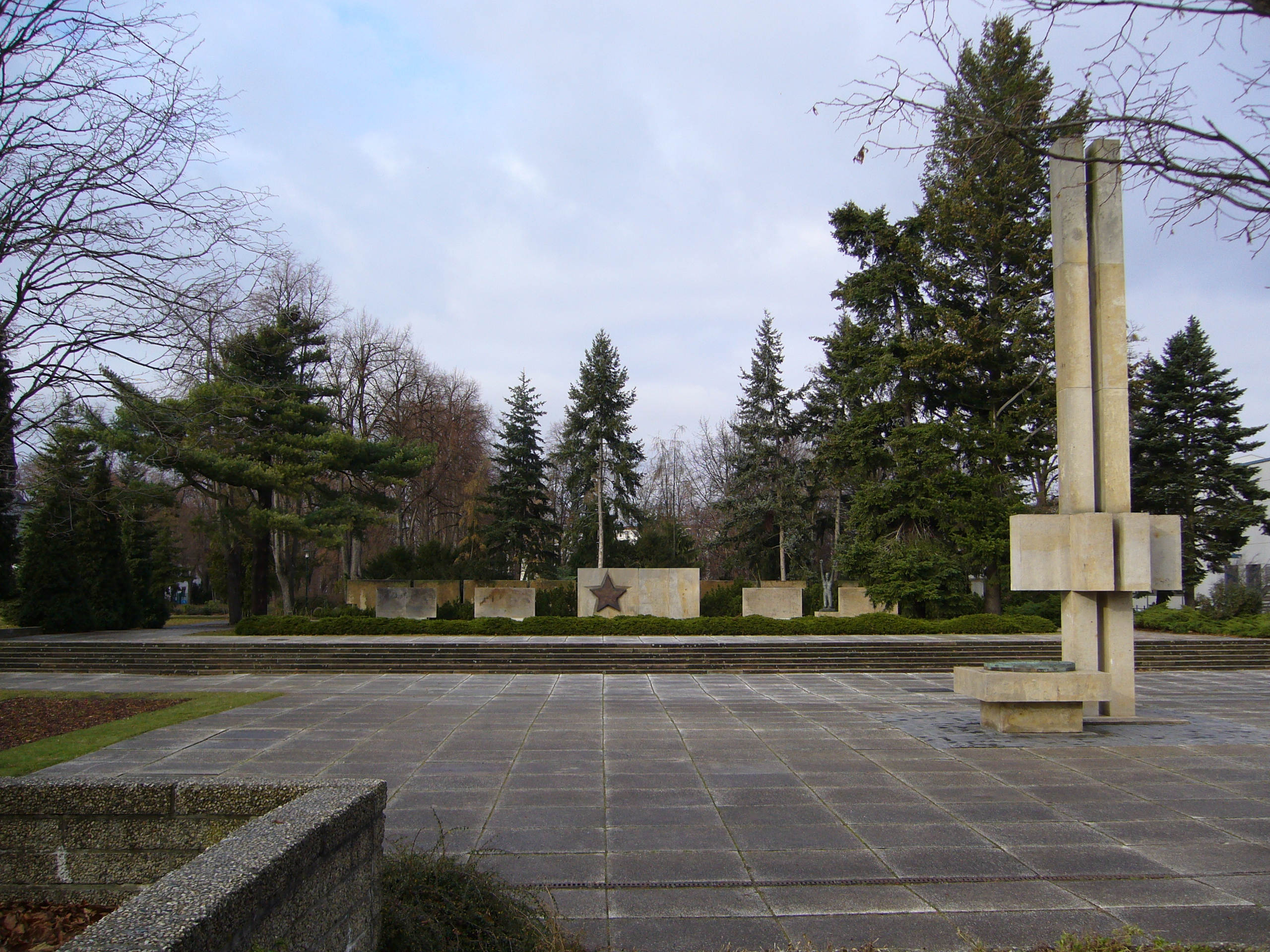 Ehrenhain in Hoyerswerda/Germany, Saxony